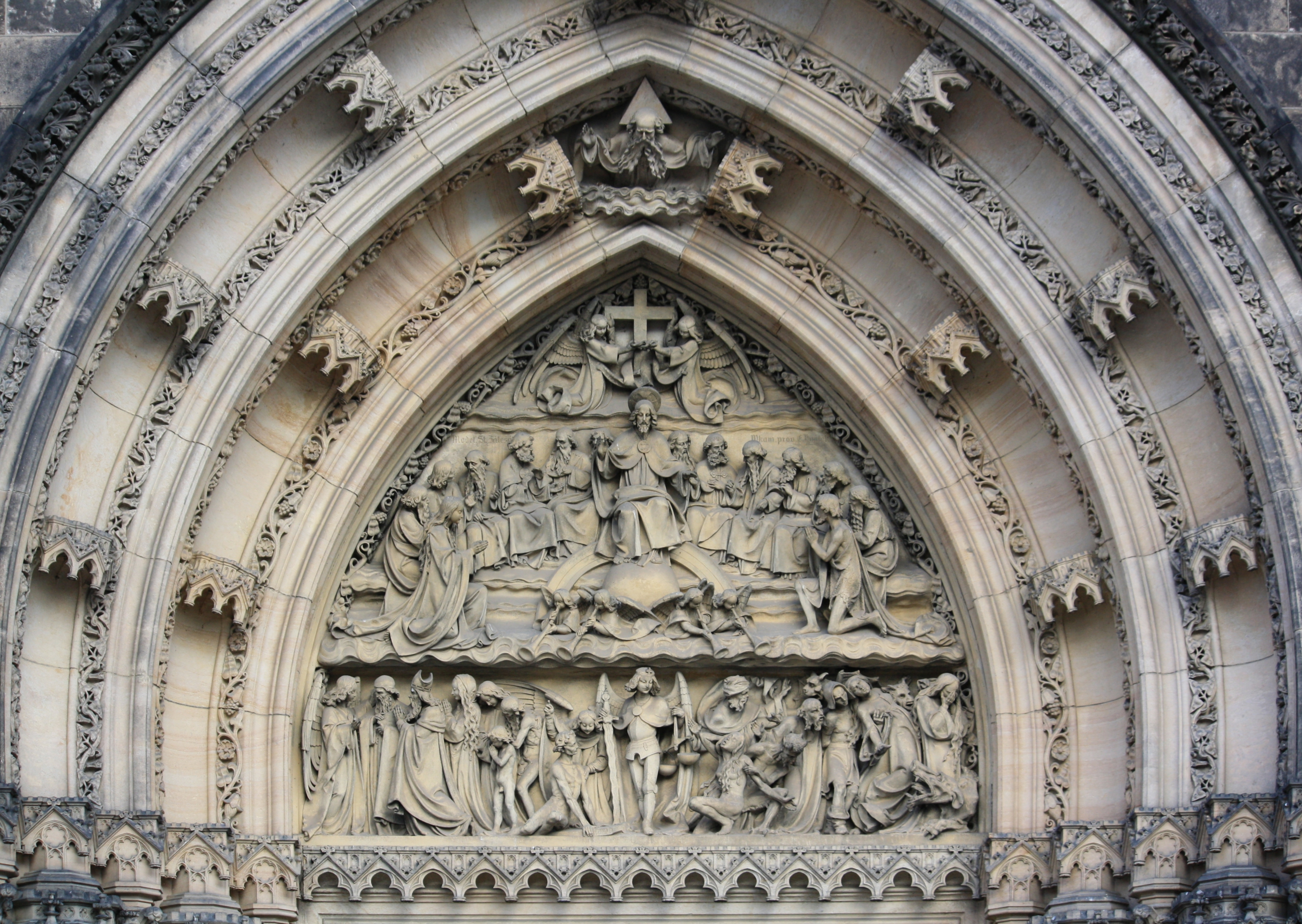 Praha, Vyšehrad - kostel svatého Petra a Pavla (detail výzdoby)